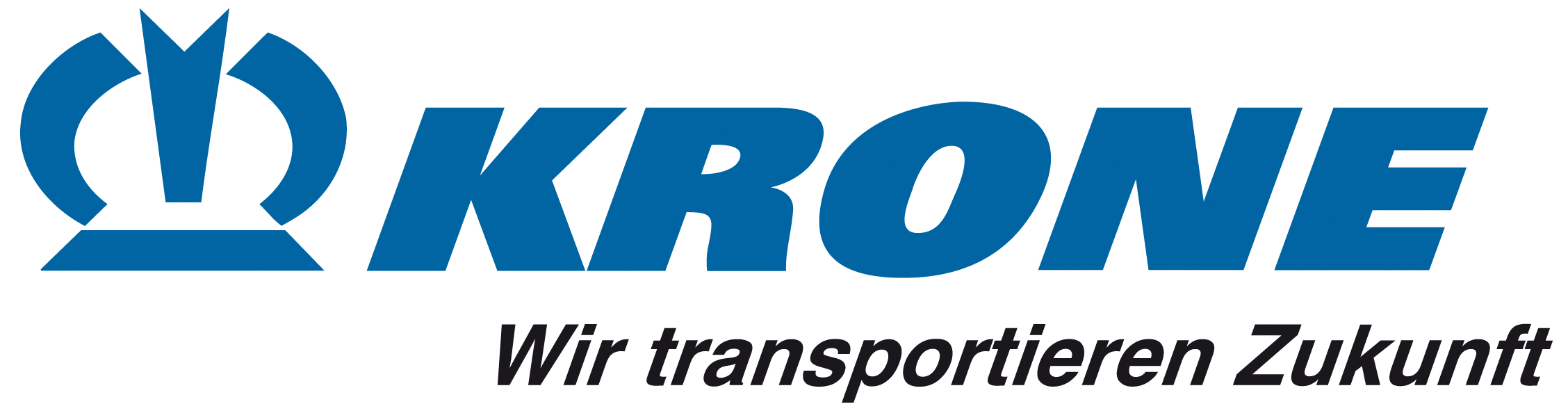 Logo von Fahrzeugwerk Bernard Krone GmbH